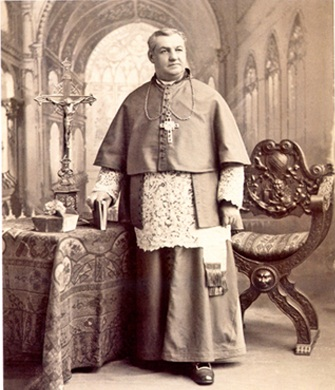 Fotografía de Mons. Ramón Ángel Jara